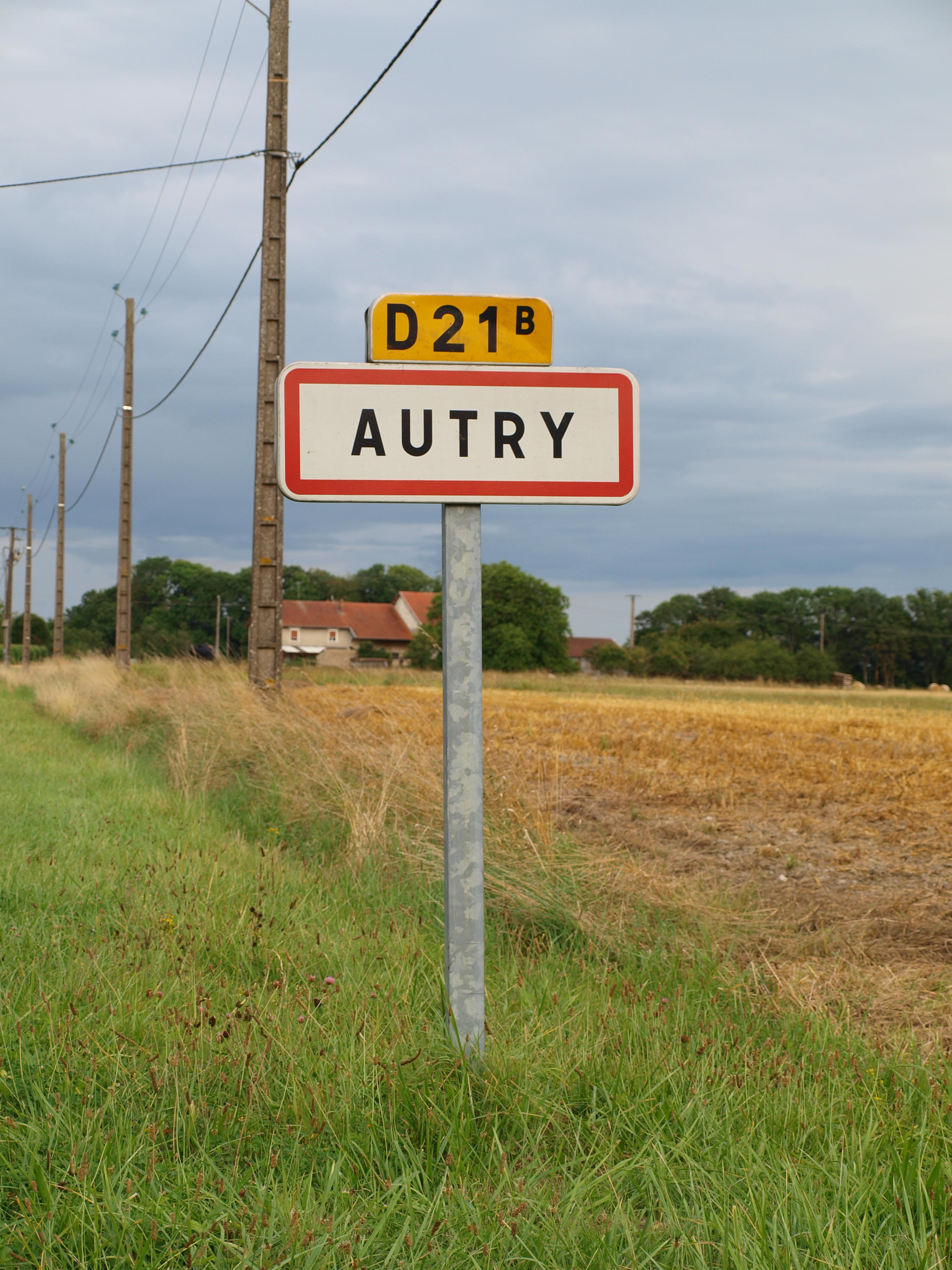 Autry (Ardennes, France) ; panneau d'agglomération.